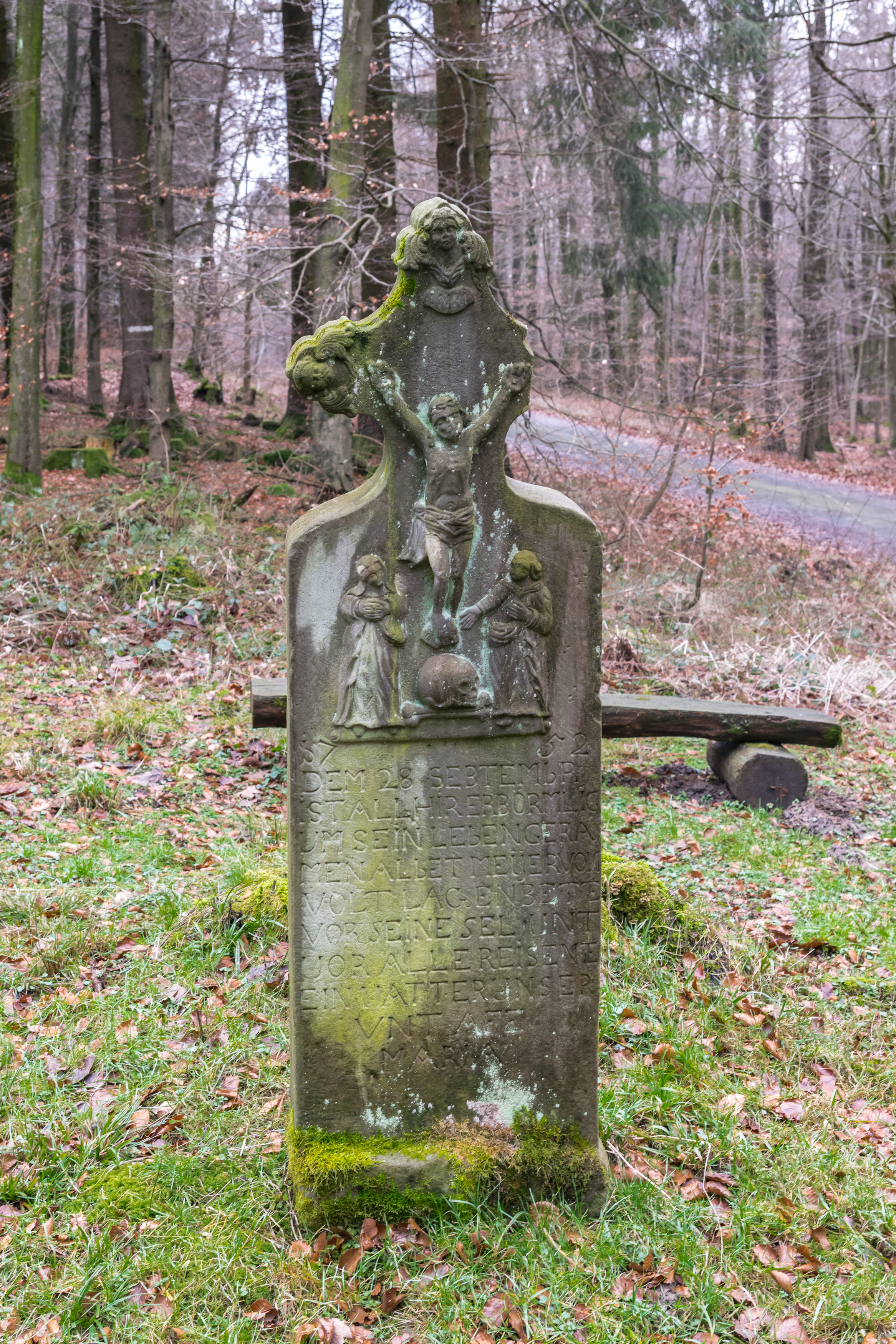 Gedenkstein Messerkerl im Wald am Schnittpunkt Altenbeken-Schlangen-Horn-Bad Meinberg